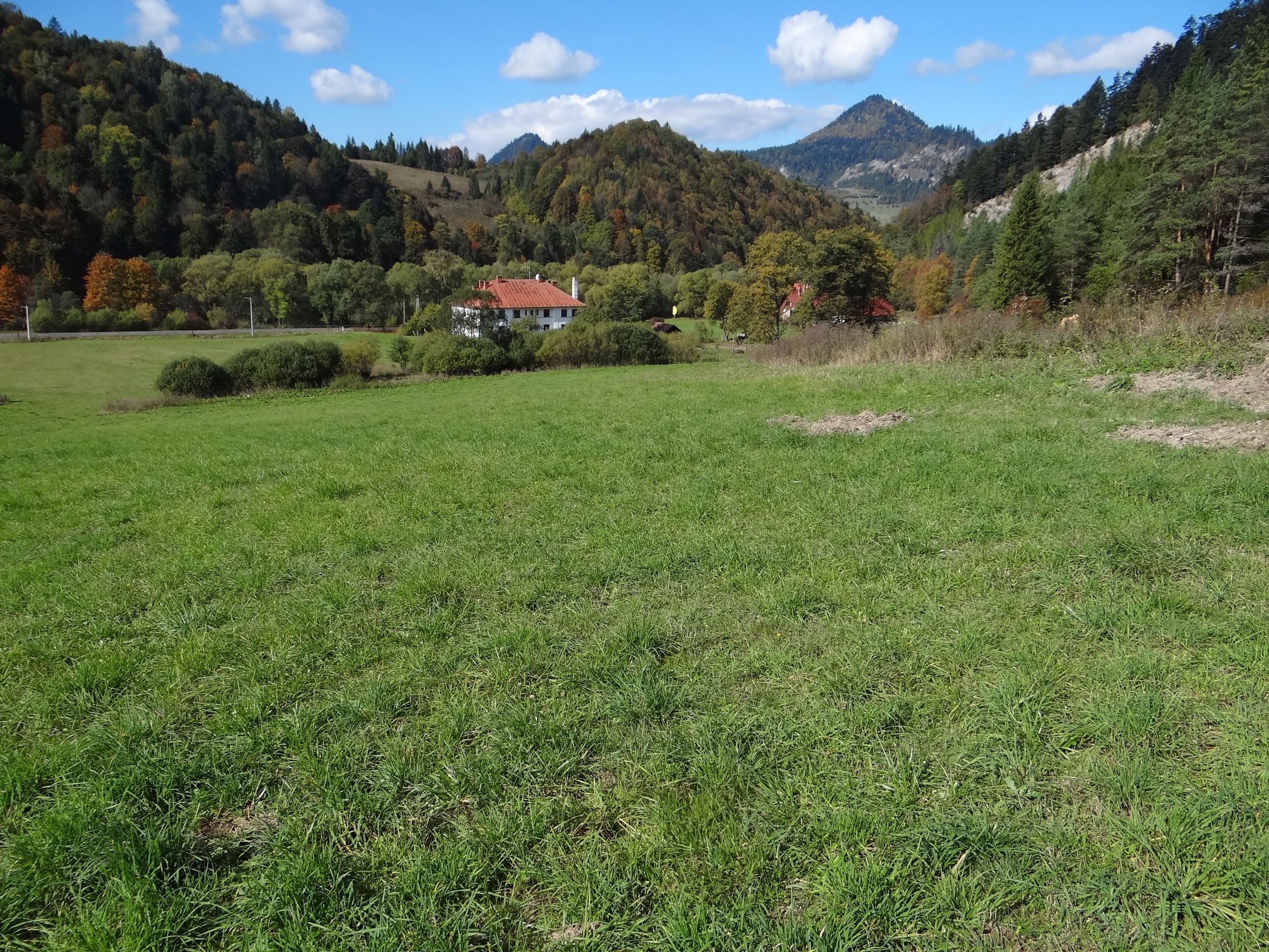 Śmierdzonka w Czerwonym Klassztorze na Słowacji